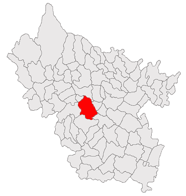 Categorie:Hărţi ale judeţului Buzău